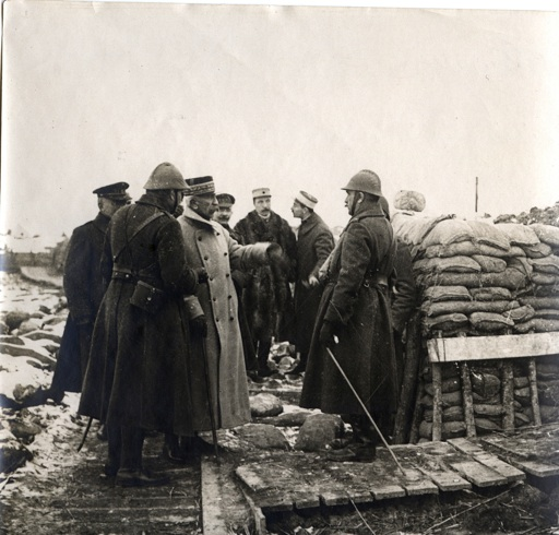 Lyautey en tournée d'inspection dans les tranchées en février 1917